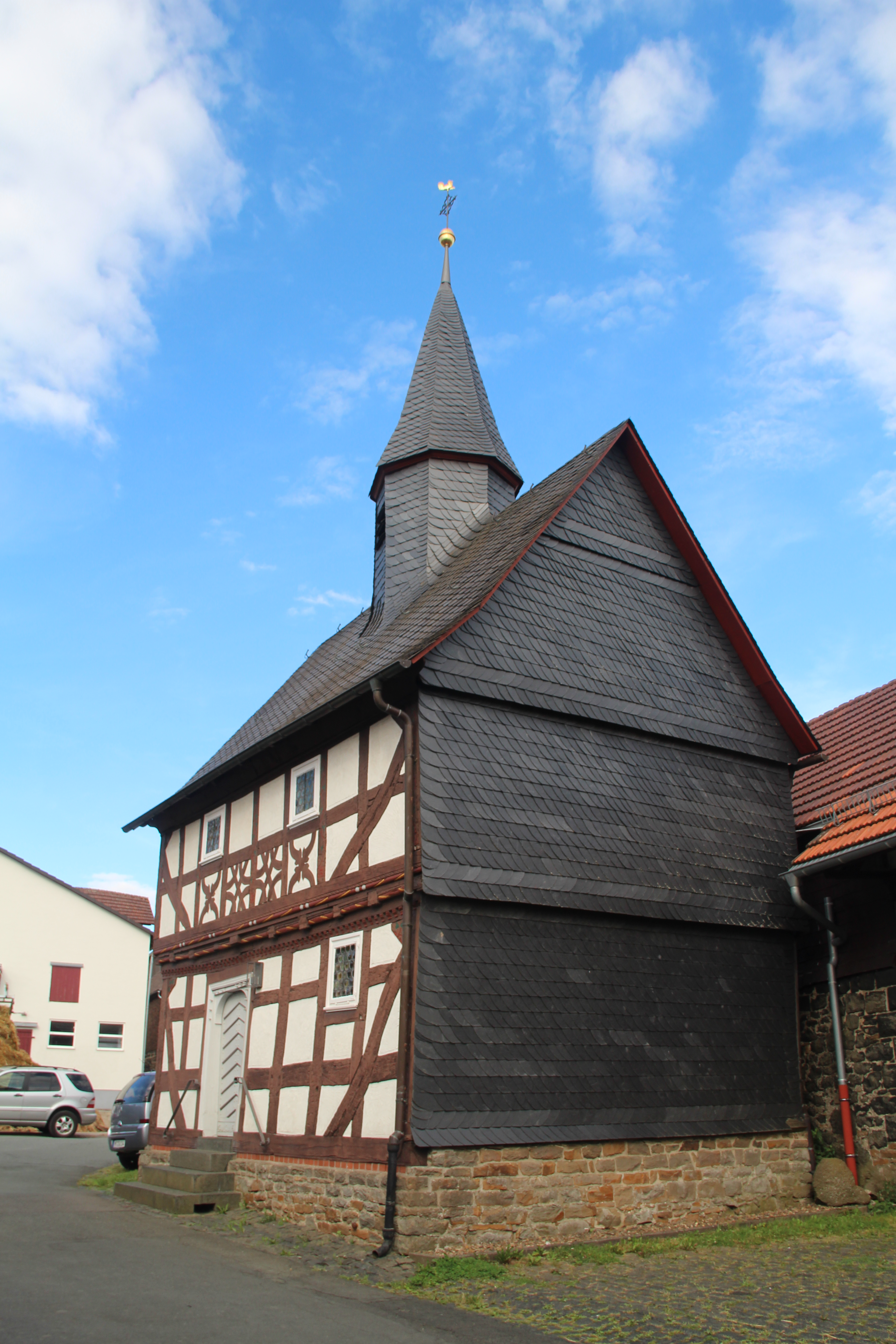 Kapelle Rachelshausen. Die verschieferte Seite ist anch Südwest ausgerichtet. Die Seite mit der Tür weist nach Nordwesten